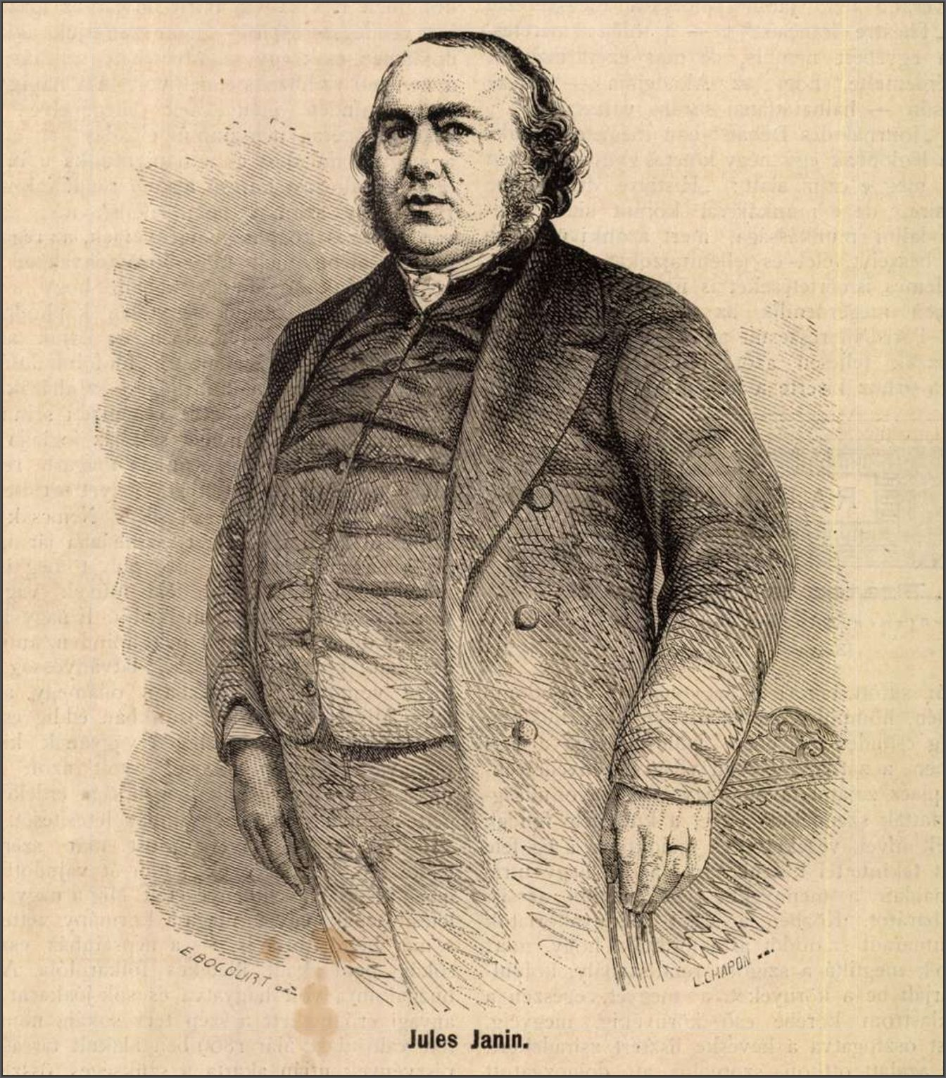 Gabriel-Jules Janin (Saint-Étienne, Loire megye, 1804. február 15. – Párizs 1874. június 19.) francia romantikus író, újságíró és színikritikus nekrológja a Magyarország és a Nagyvilág, 10. évf. 1874. június 28. 26. szám – címlapján